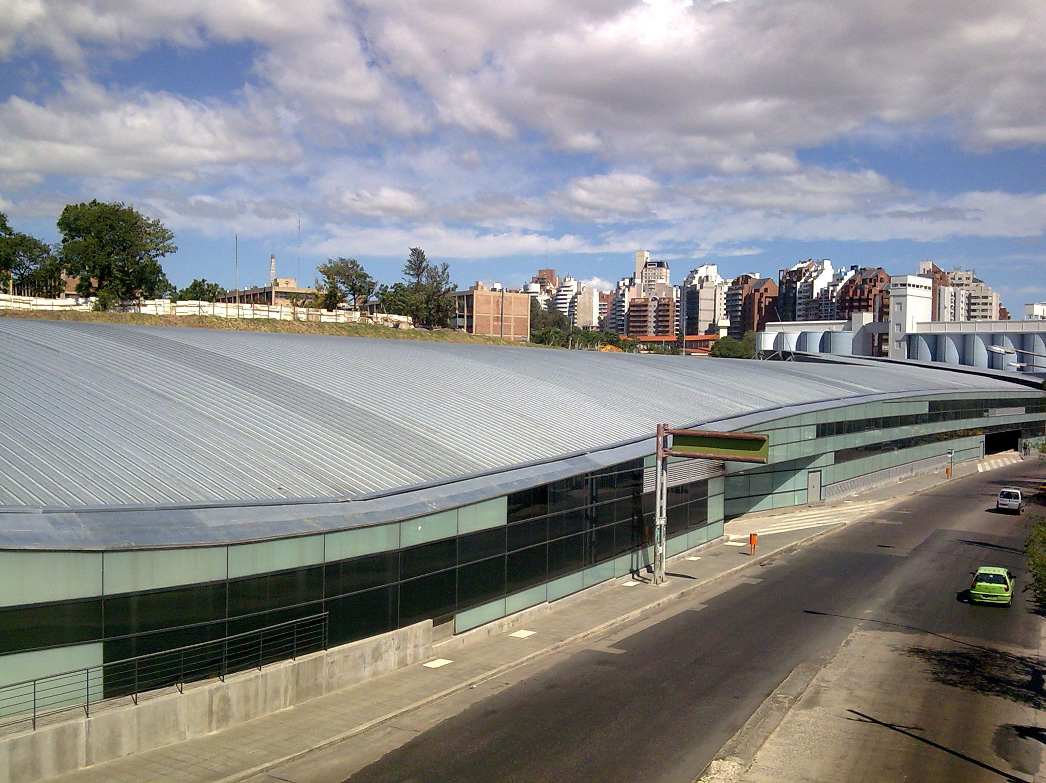 Terminal 2 de ómnibus Córdoba, inaugurada en 2011.